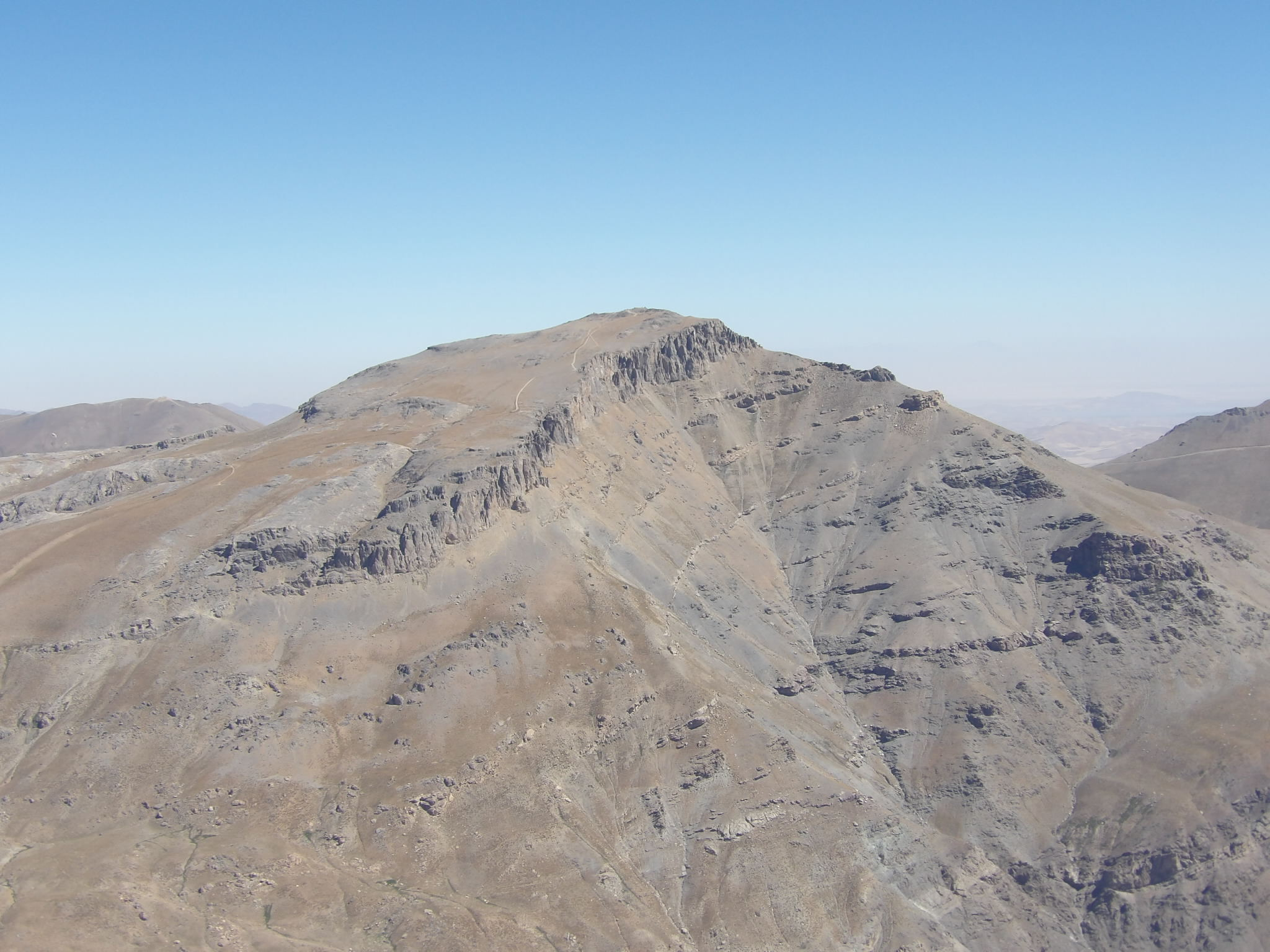 Blick vom Halgurd (3607 m) auf die SW-Seite des Cheeka Dar.